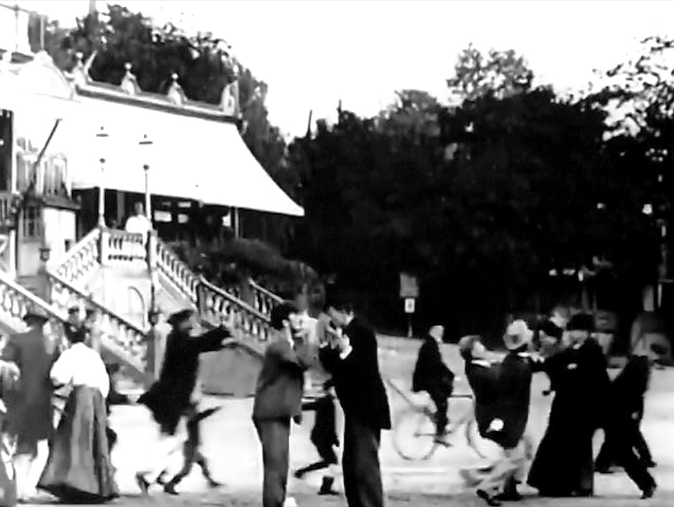 Stillbild aus dem Stummfilm: Komische Begegnungen im Tiergarten zu Stockholm